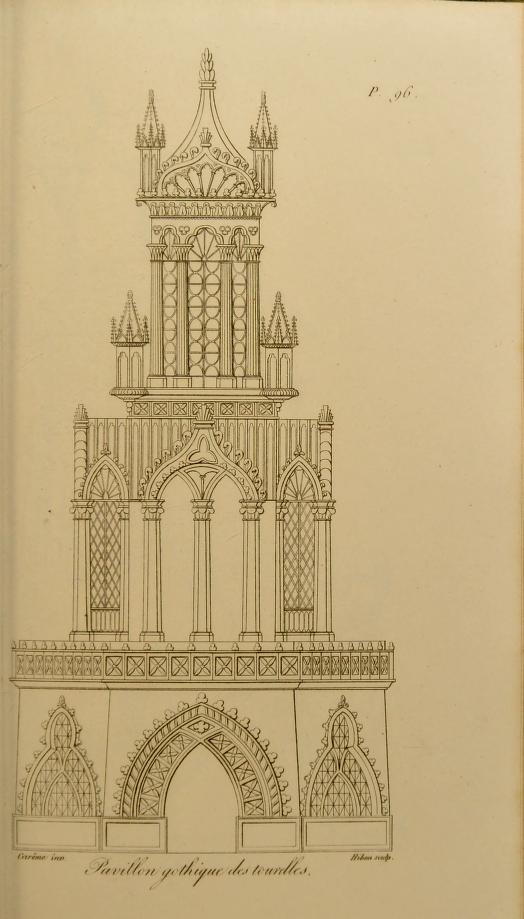 安東南‧卡漢姆的「裝置」藝術蛋糕設計圖樣